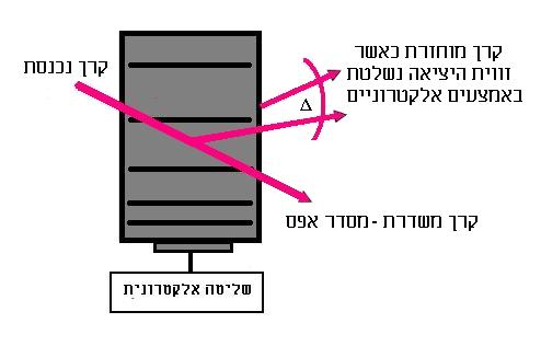 דיאגרמה שמתארת טכניקות סריקה